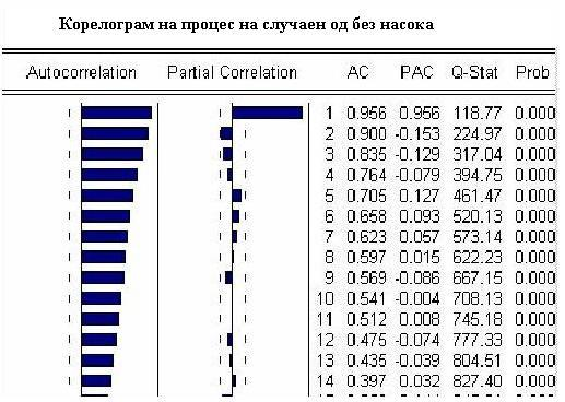 Корелограм на процес на случаен од без насока